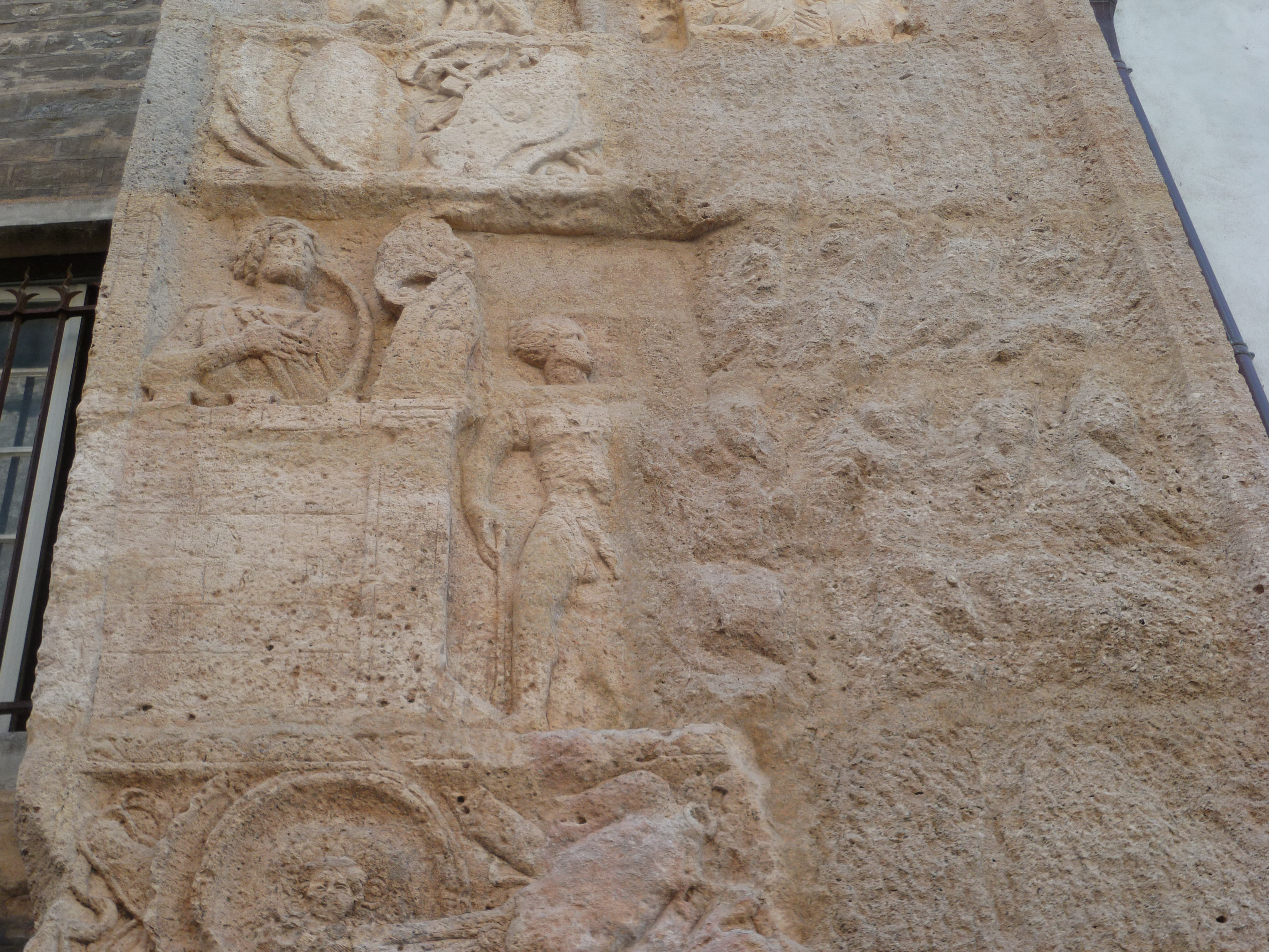 Arc de triomphe édifié sous l'empereur romain Marc Aurèle au iie siècle à Besançon